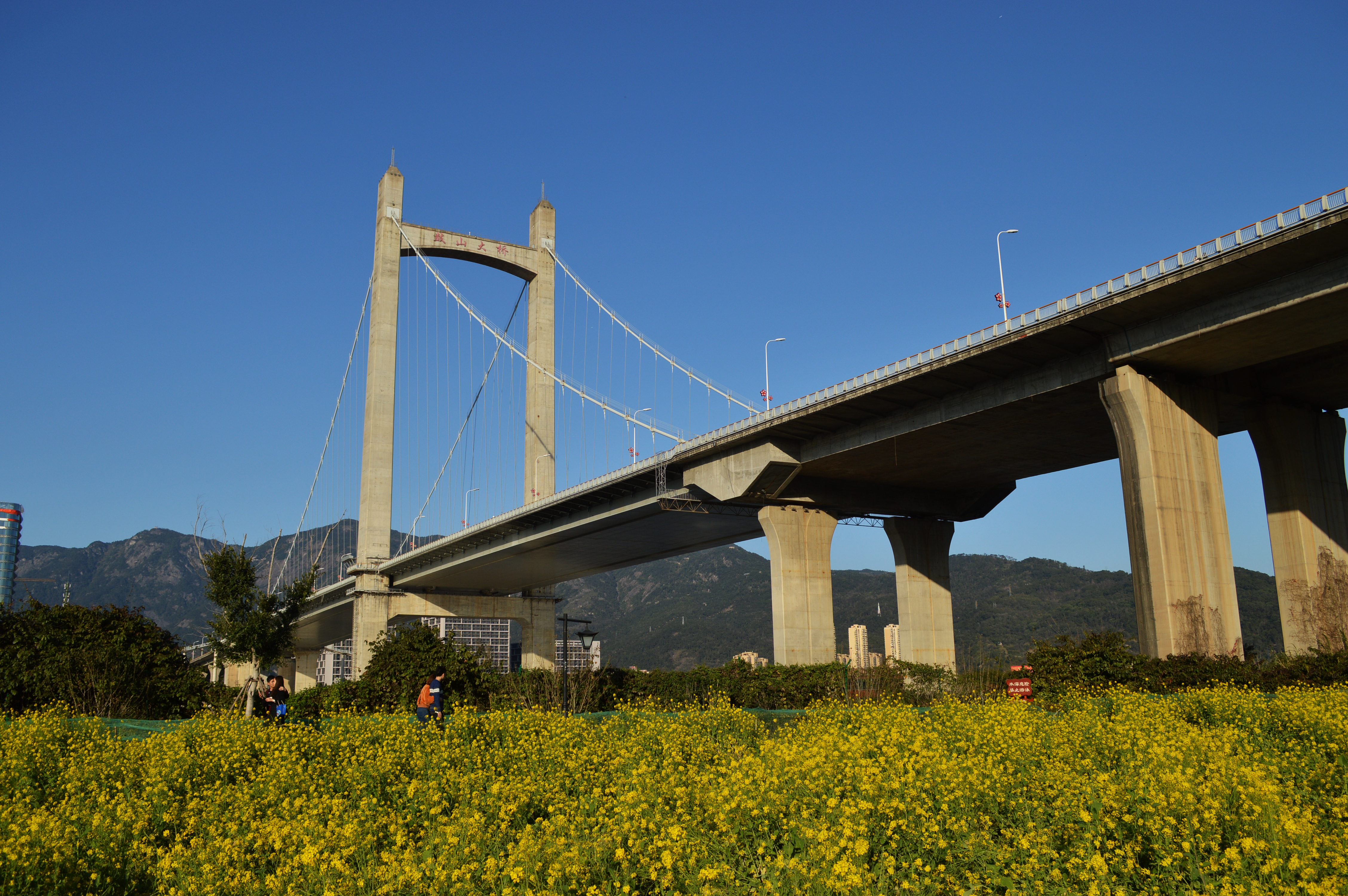 2018福州花海公园油菜花，背后是鼓山大桥。